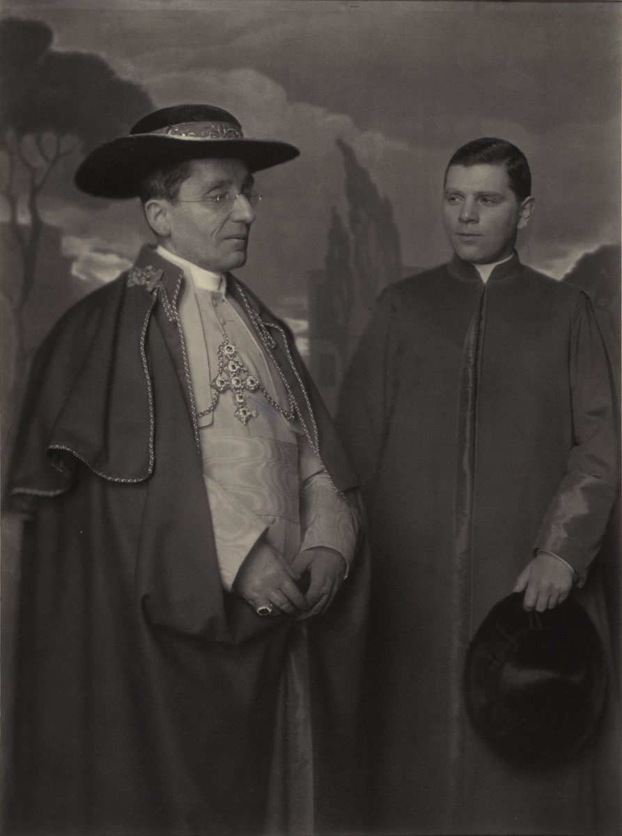 Papst Benedikt XV. mit Monsignore Gerlach